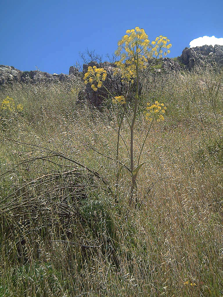 Thapsia villosa, Puertollano, May, 24 , 2008.